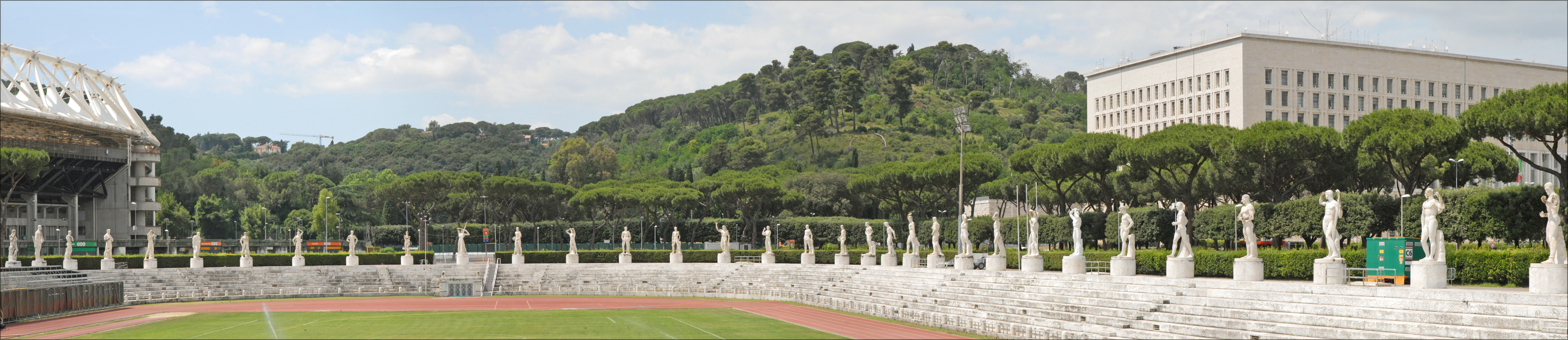 Le stade des marbres (Photo panoramique) A gauche, le stade olympique ____________ Le Foro Italico, appelé dans les années 30, Foro Mussolini, est un grand ensemble de bâtiments et d'équipements sportifs. Sa construction a débuté à l'époque fasciste sous la direction de l'architecte Enrico Del Dubbio. Le Foro a été inauguré en 1932. A l'entrée, un obélisque en marbre dédié à Mussolini a été érigé. Le stade des marbres est l'équipement le plus célèbre avec ses 60 statues d'athlètes à l'antique, placées au-dessus des gradins et offertes par les villes et provinces d'Italie. A l'entrée, se trouvait l'Académie d"éducation physique, constituée de deux corps de bâtiments rouges, symétriques et reliés par une loggia. Les locaux sont occupés aujourd'hui par le comité olympique italien. A proximité, un stade olympique a été construit pour les jeux de 1960 puis agrandi pour la coupe du monde de 1990.